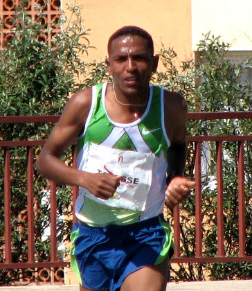 Zersenay Tadesse en Cáceres